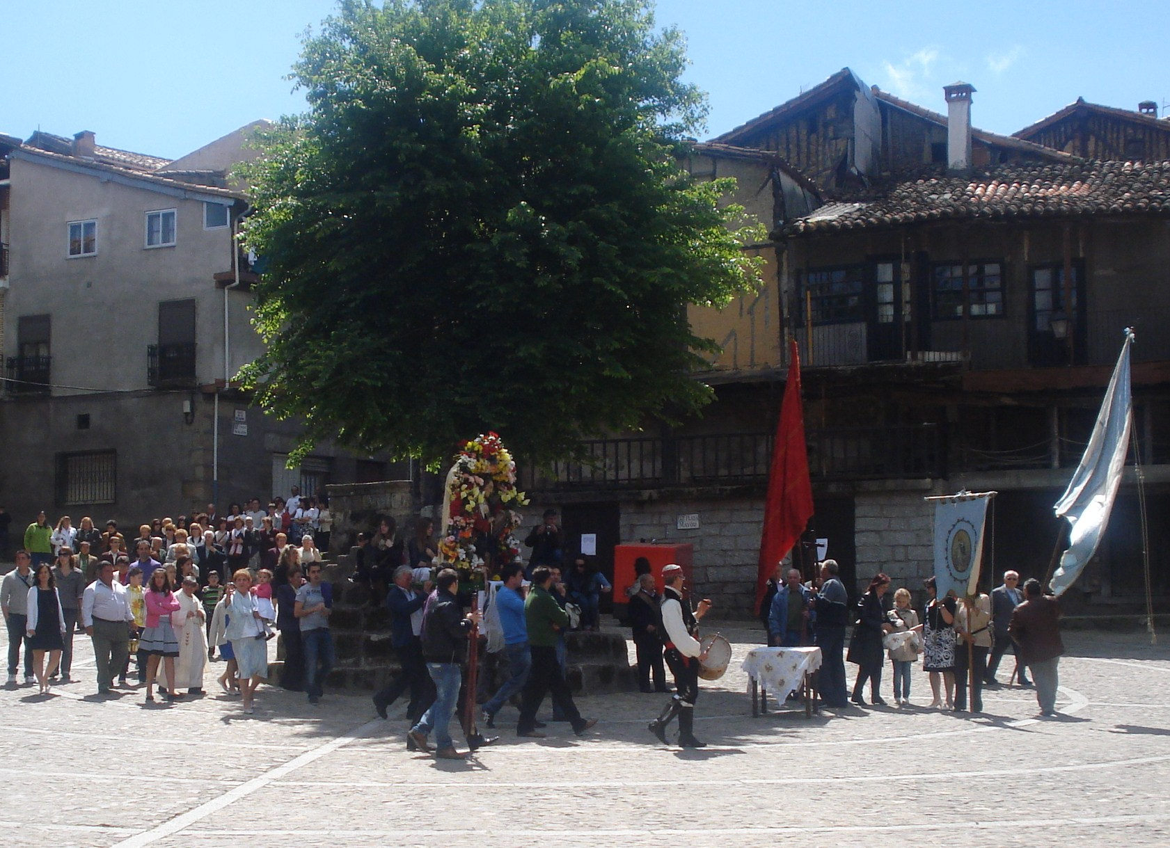 San marcos llega a la Plaza Mayor